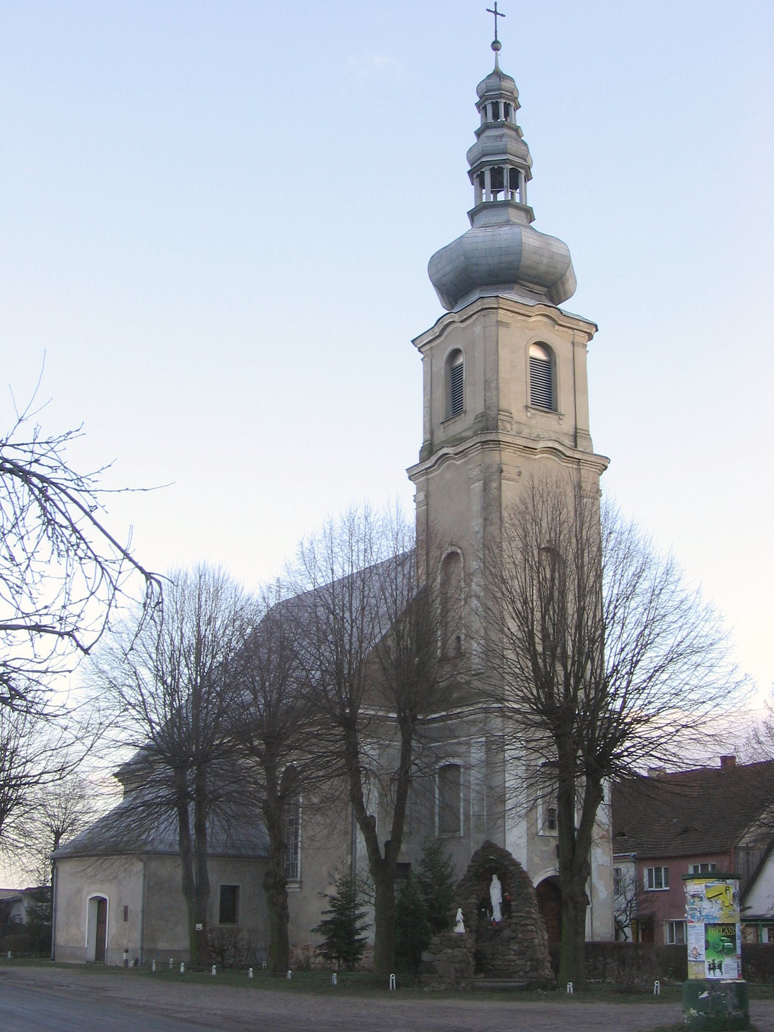 village Uraz, Poland - Michael Archangel church (built 1750-1789)